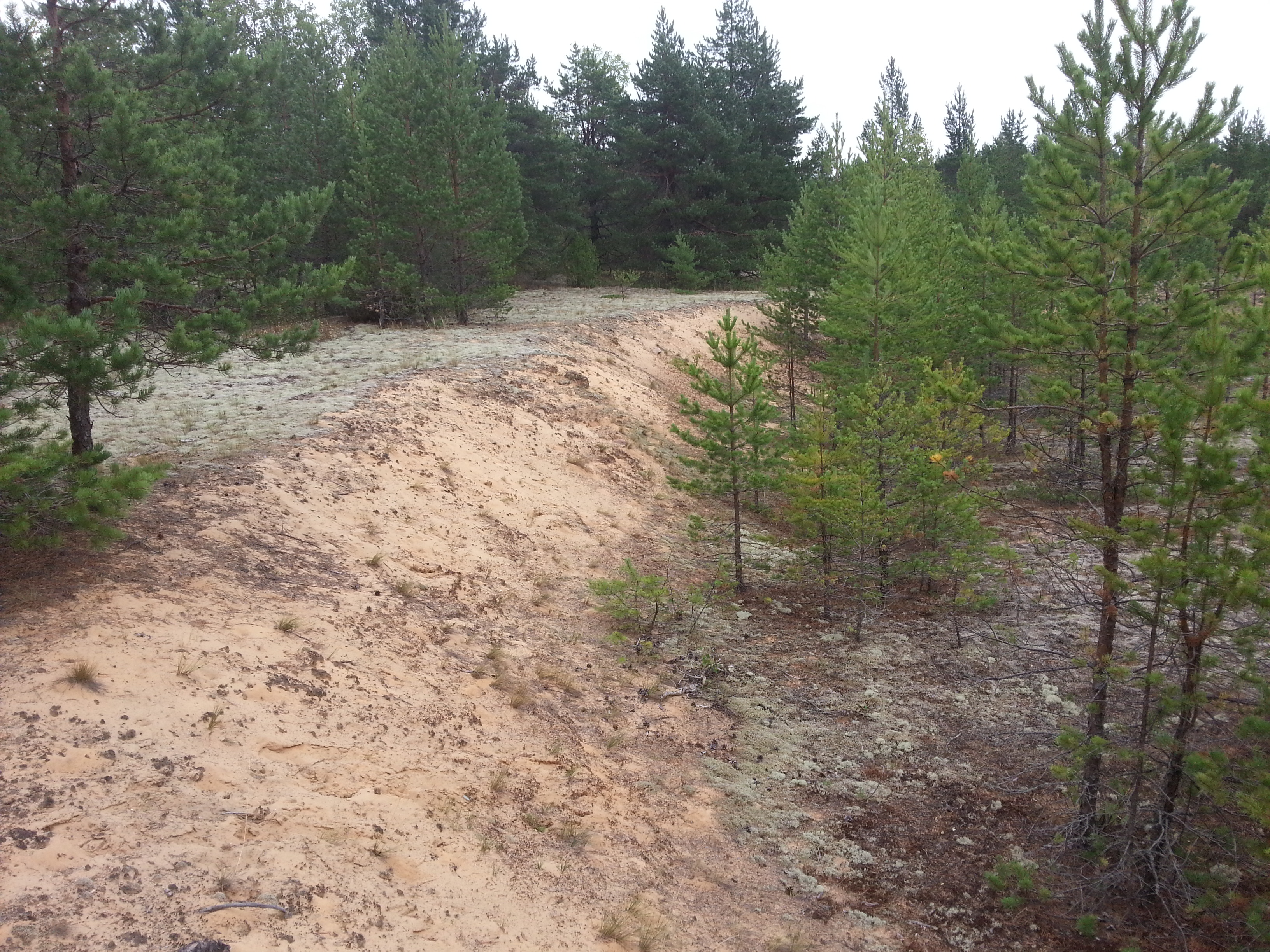 Lutepää liivik